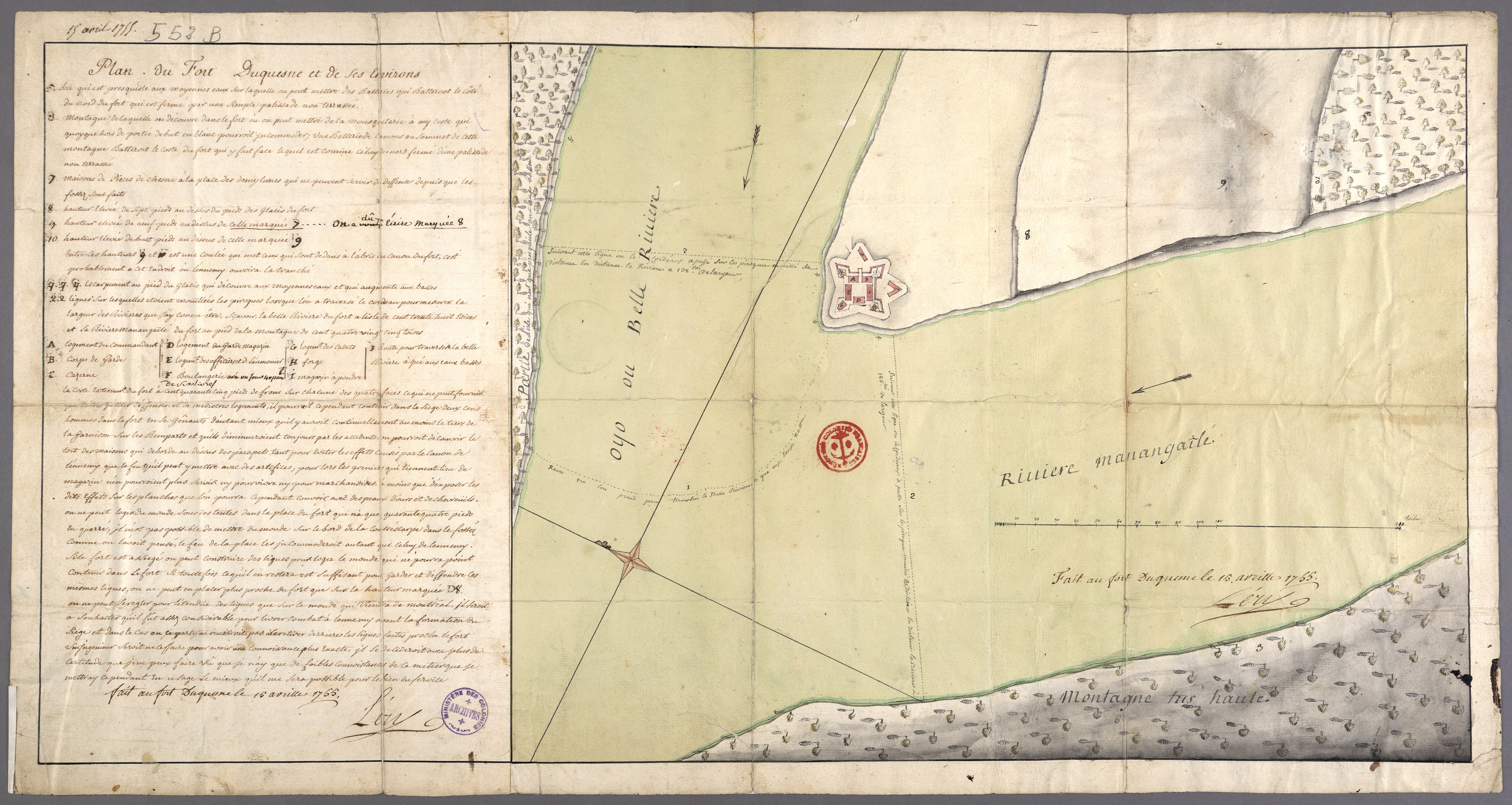 Plan du fort Duquesne, 15 avril 1755. [signé] Léry fils. Indication du cours des eaux de la Manangaîlé (Monongahela); végétation; relief; gués. Lettre de Vaudreuil.